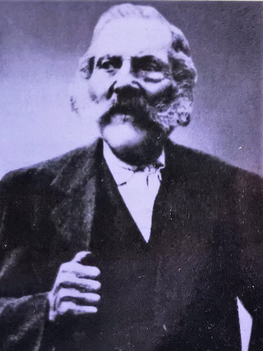 Jean-Pierre Prommenschenkel (1843-1937), considéré comme le constructeur du pont dit Schiessentumpel.